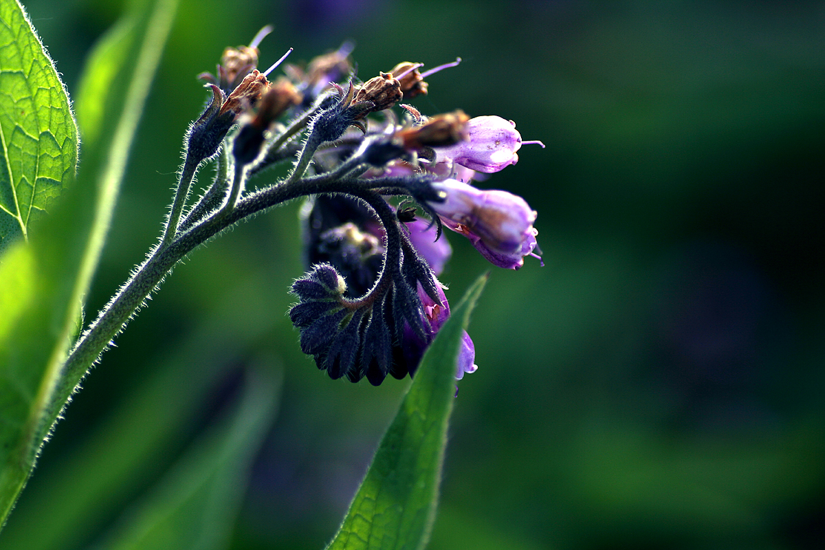 Beinwell Blüte (Symphytum officinale)